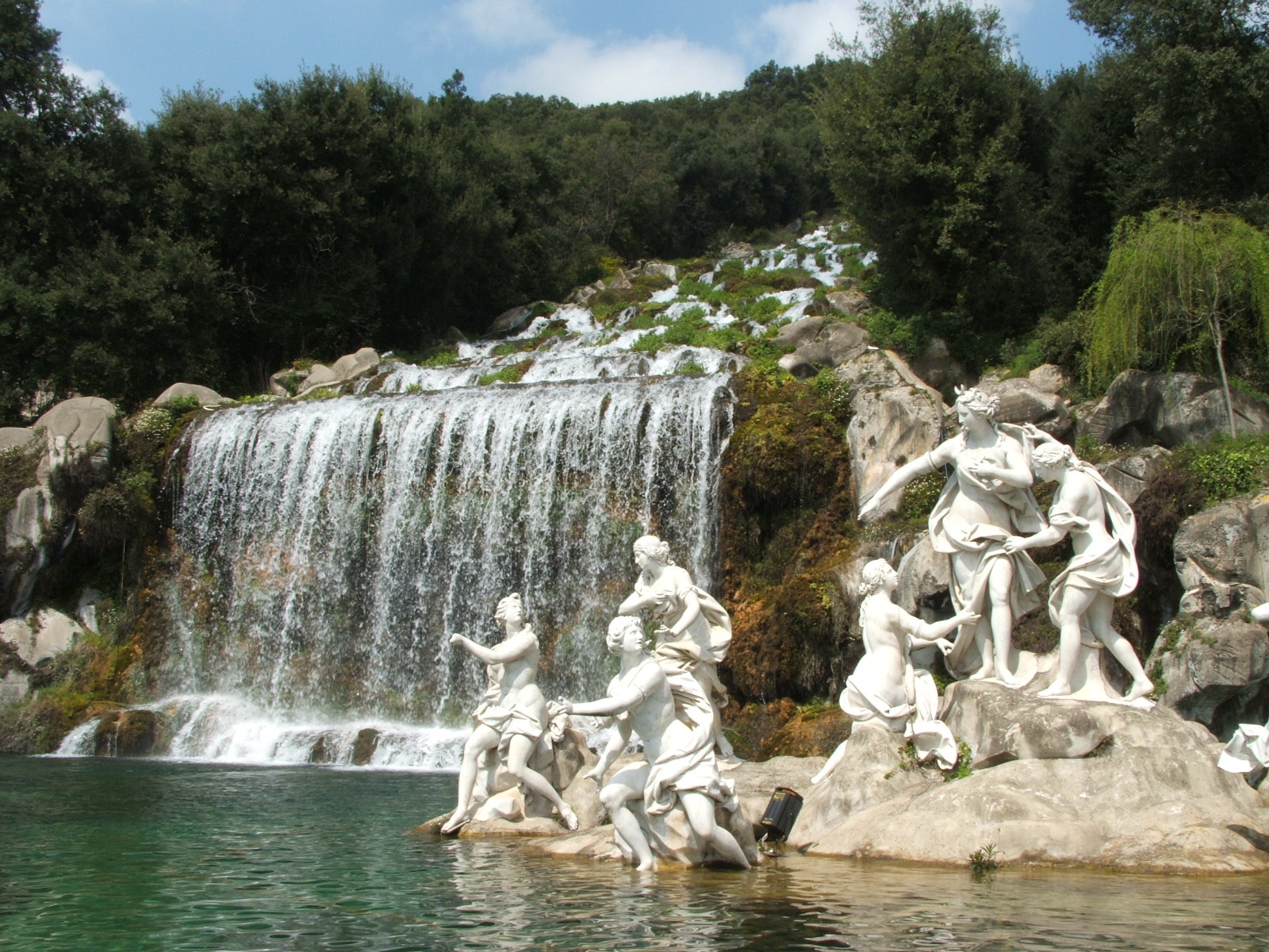 Immagine dalla Reggia di Caserta, Caserta, Campania, Italia. Statue e fontane nel parco